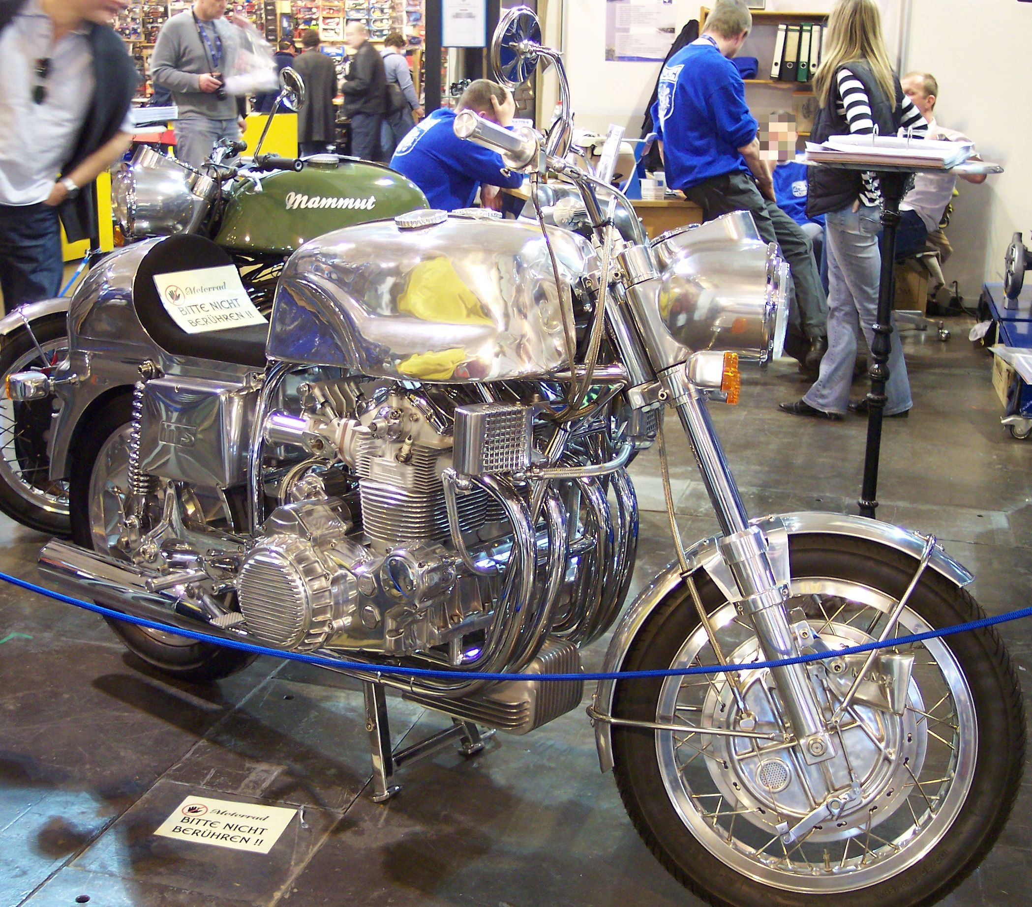 Münch